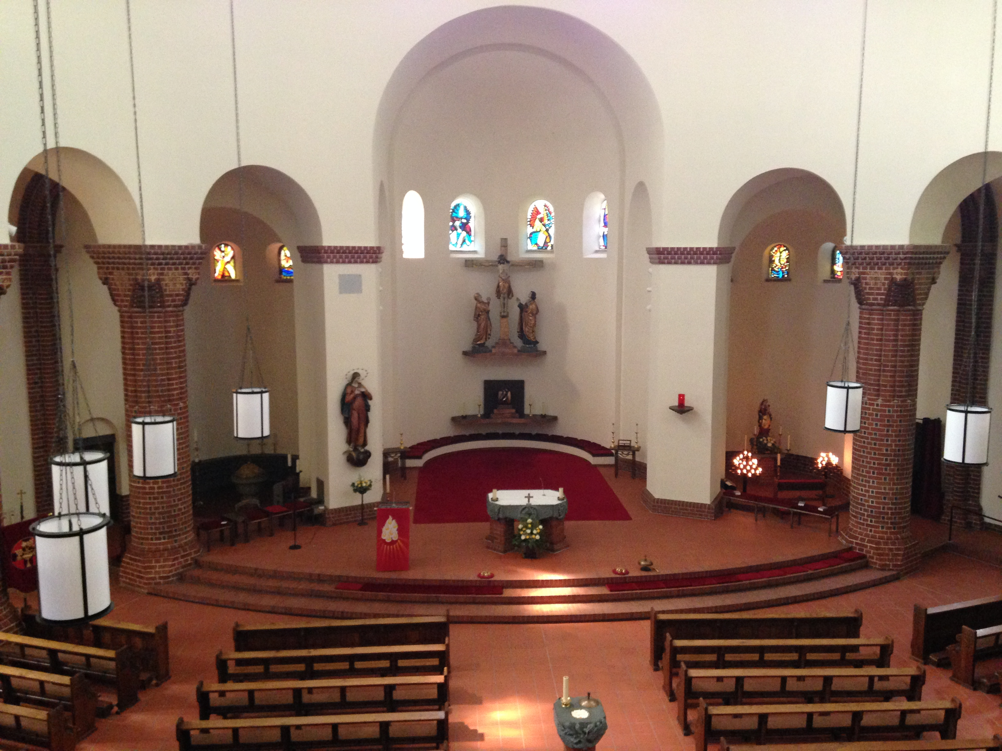 St. Marien Berlin-Wilmersdorf Kircheninnenraum